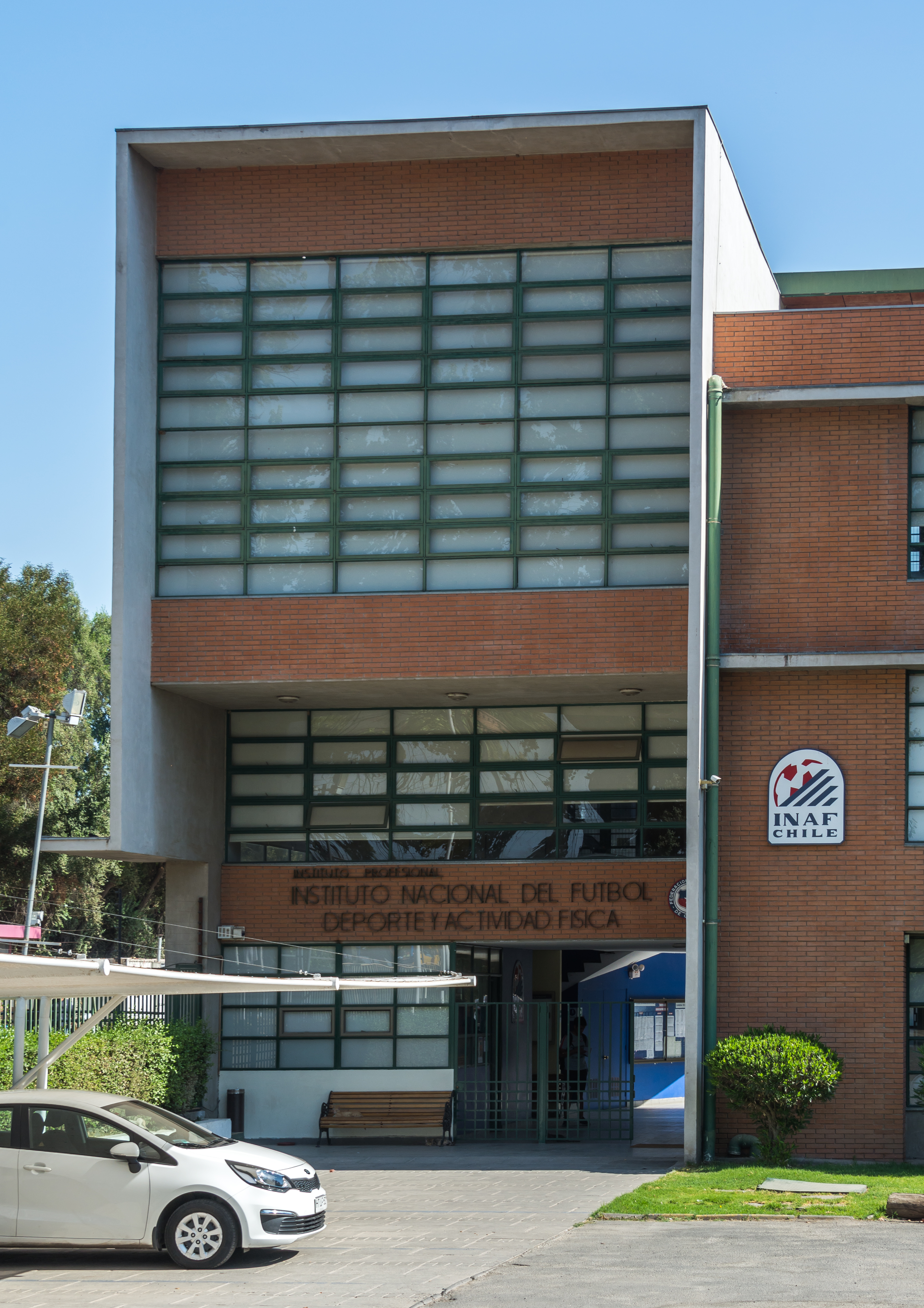 Sede del Instituto Nacional del Fútbol, Peñalolén, Santiago, Región Metropolitana, Chile.